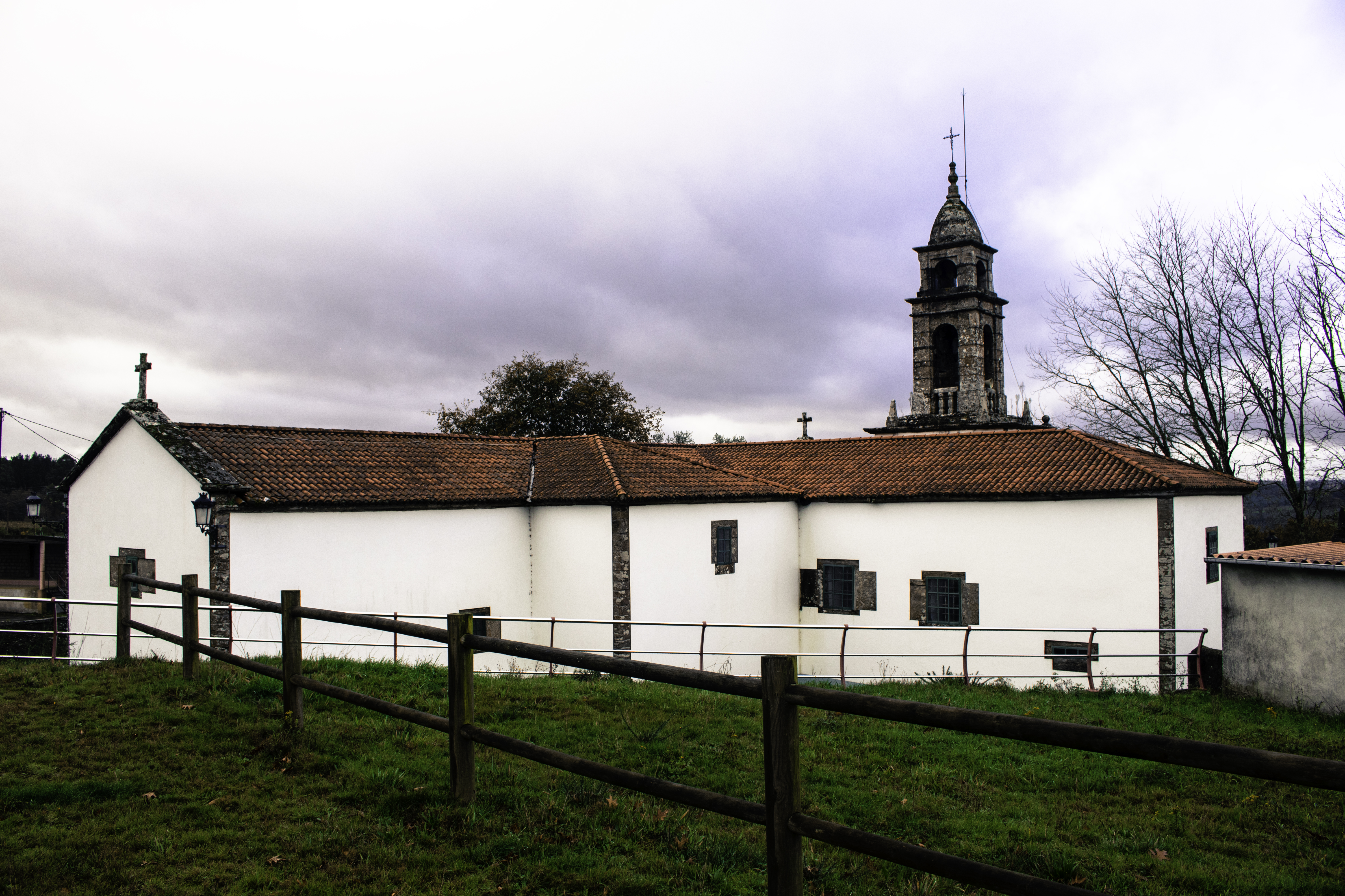 Igrexa de San Xiao de Lardeiros, no concello coruñés do Pino.